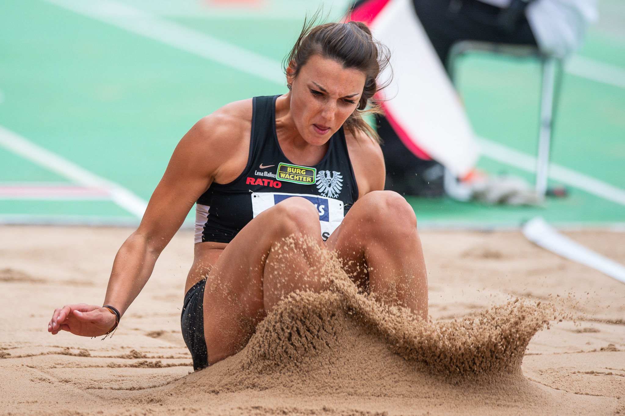 DLV,Deutsche Leichtathletik Meisterschaften 2018,Deutscher Leichtathletik-Verband,Lena Malkus,Long jump,Max-Morlock-Stadion,SC Preußen Münster,Weitsprung